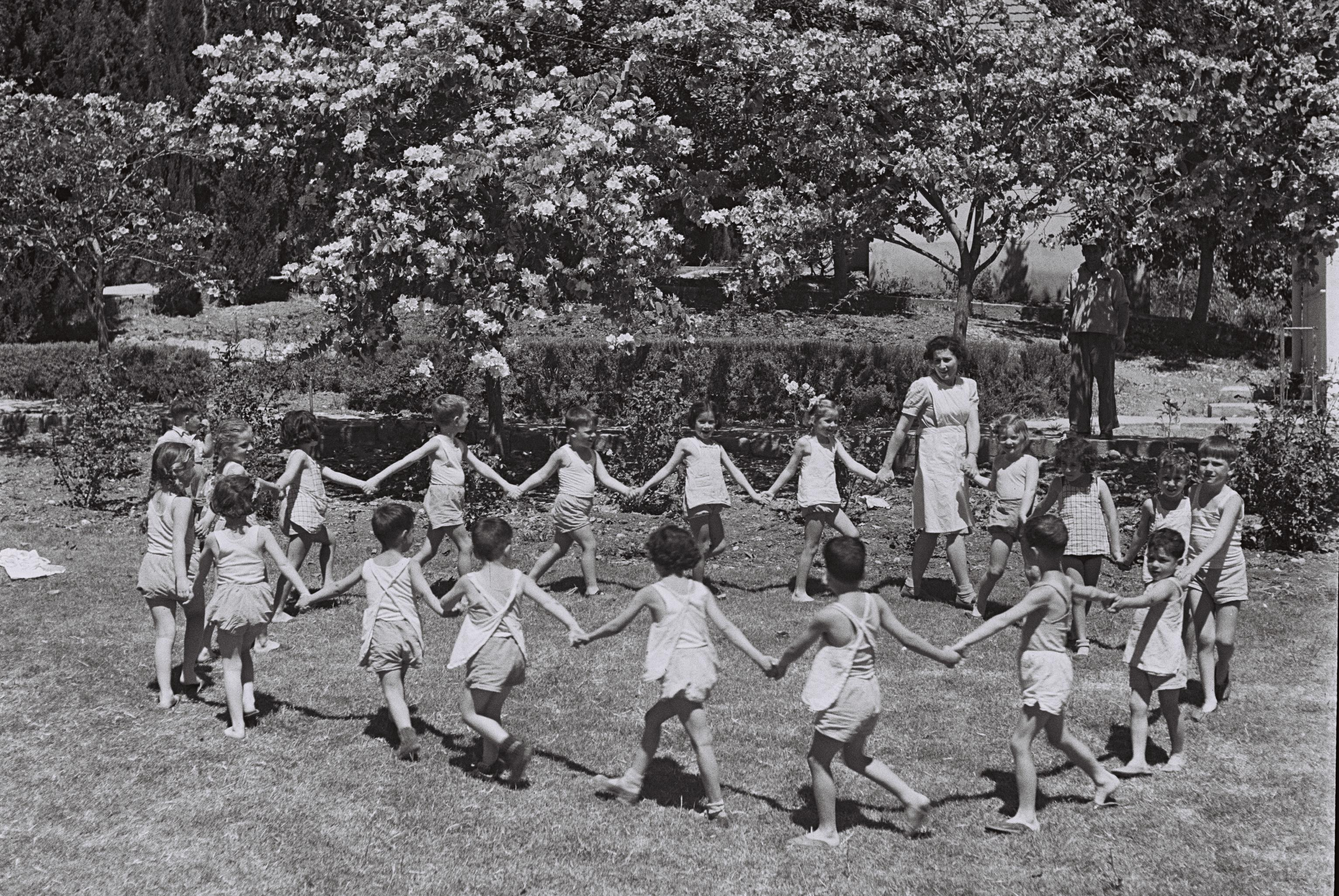 Children dancing at Kibbutz Ginnegar. ילדי קיבוץ גניגר רוקדים במעגל